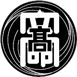 立命館守山高等学校の校章